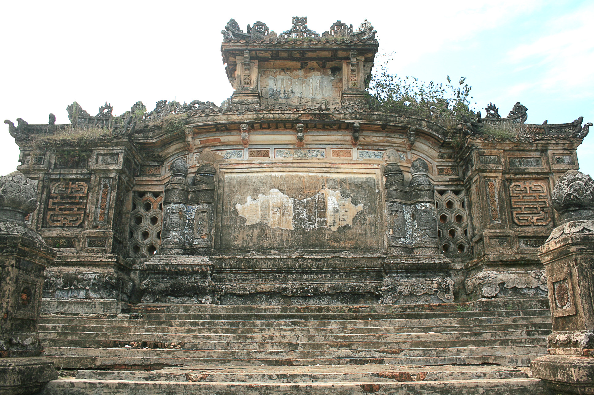 Mặt sau Đài tưởng niệm chiến sĩ Trận Vong (Huế)